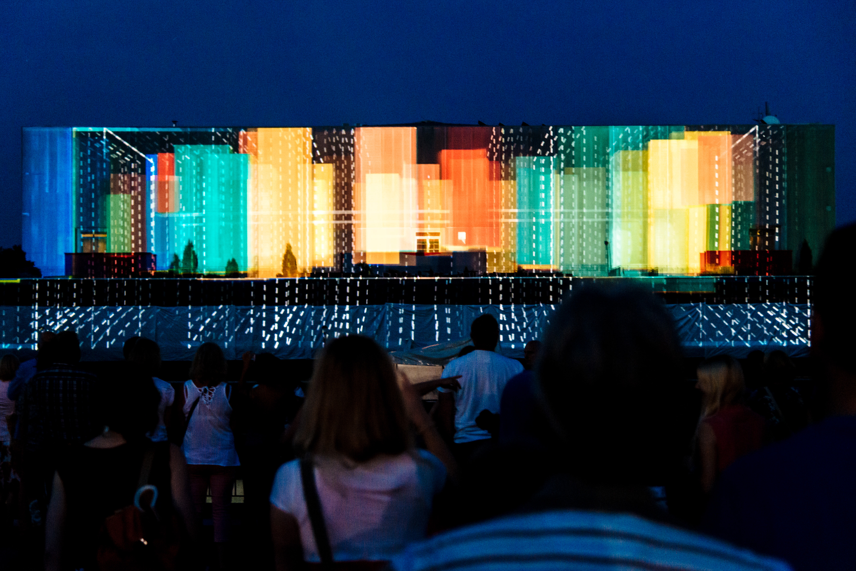 Videomapping "Zoetropolis" von MammasONica, 2015 am Atrium Weimar. Foto: Henry Sowinski